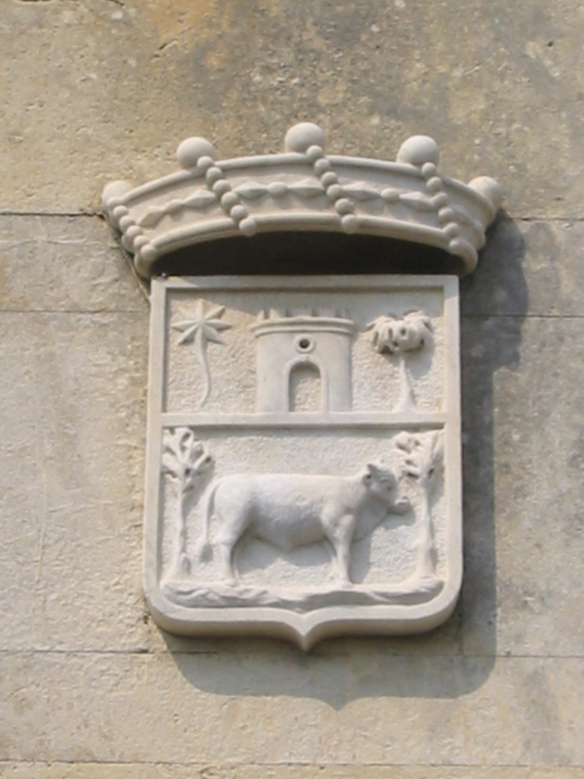 Stemma araldico della Famiglia Bufali